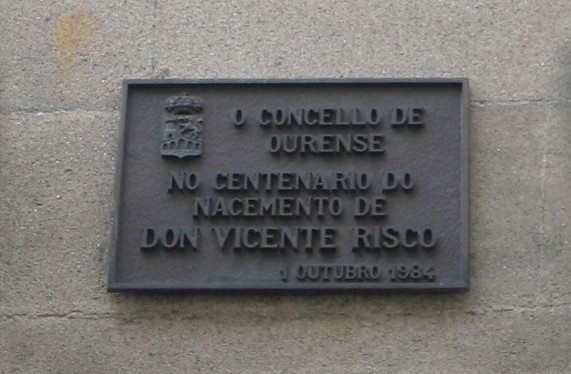 Placa na casa natal de Vicente Risco (rúa da Paz, Ourense).